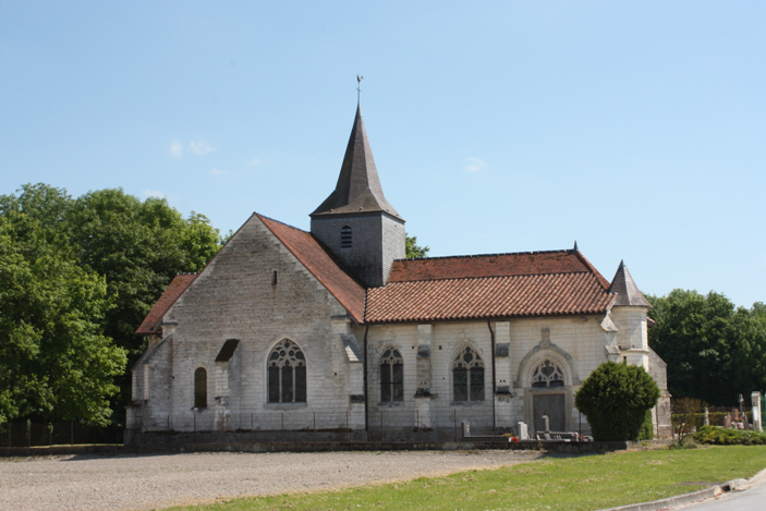 Église Saint-Étienne de Saint-Ouen-Domprot (Classé) .